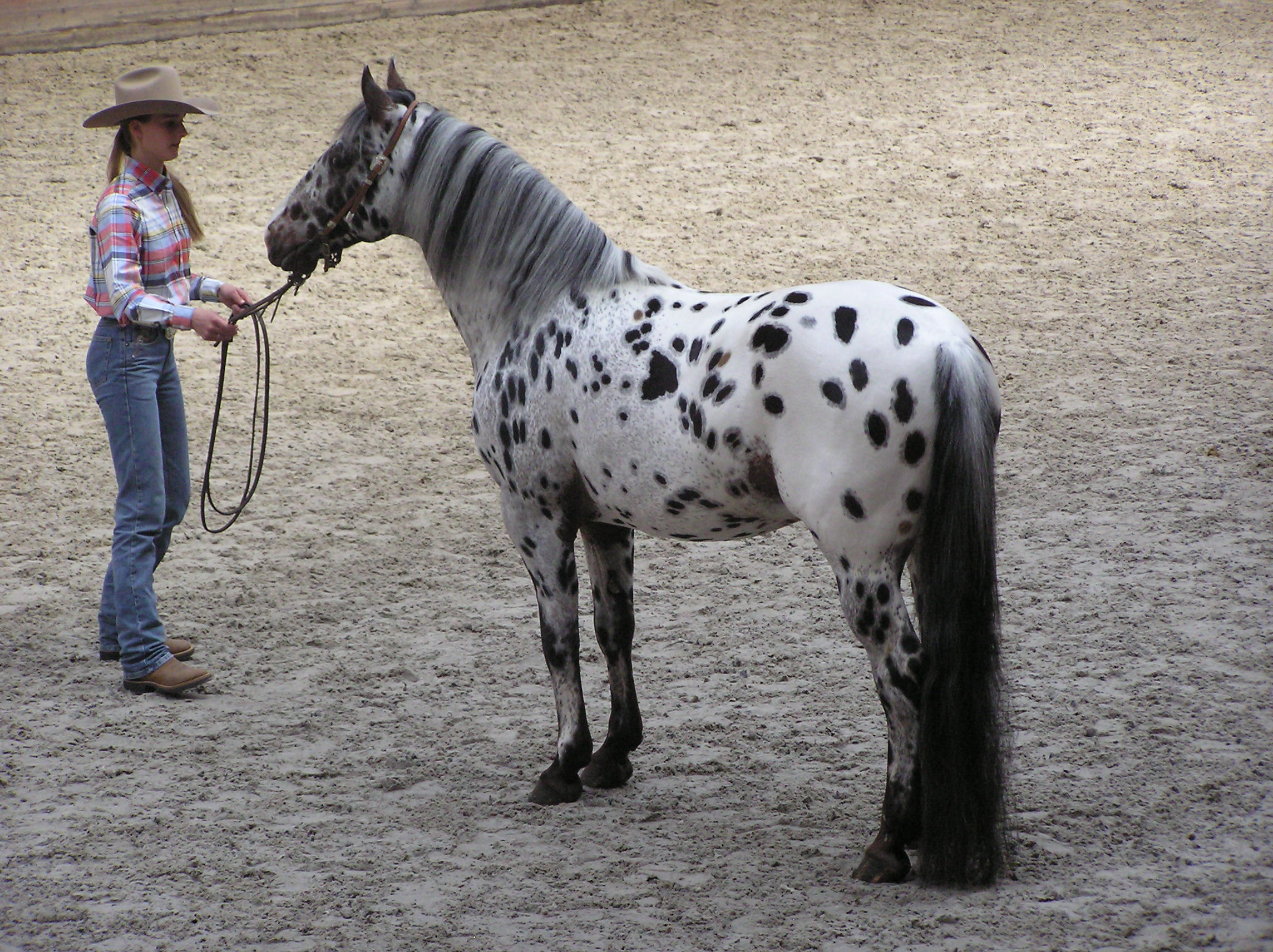 Appaloosa stallion; horse show, Císařský ostrov, Prague, Czech Republic